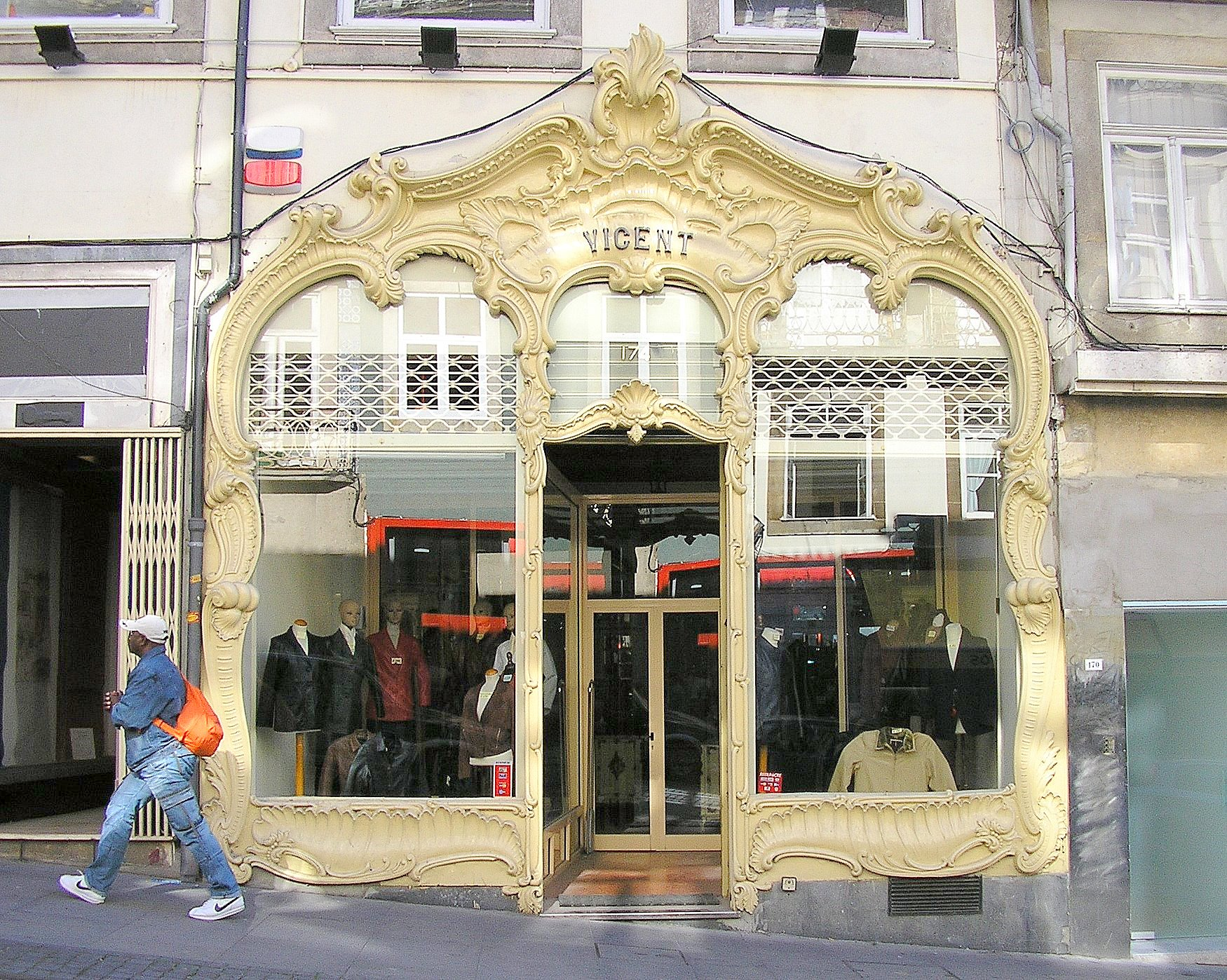 "Casa Vicent" shop in Porto, Portugal